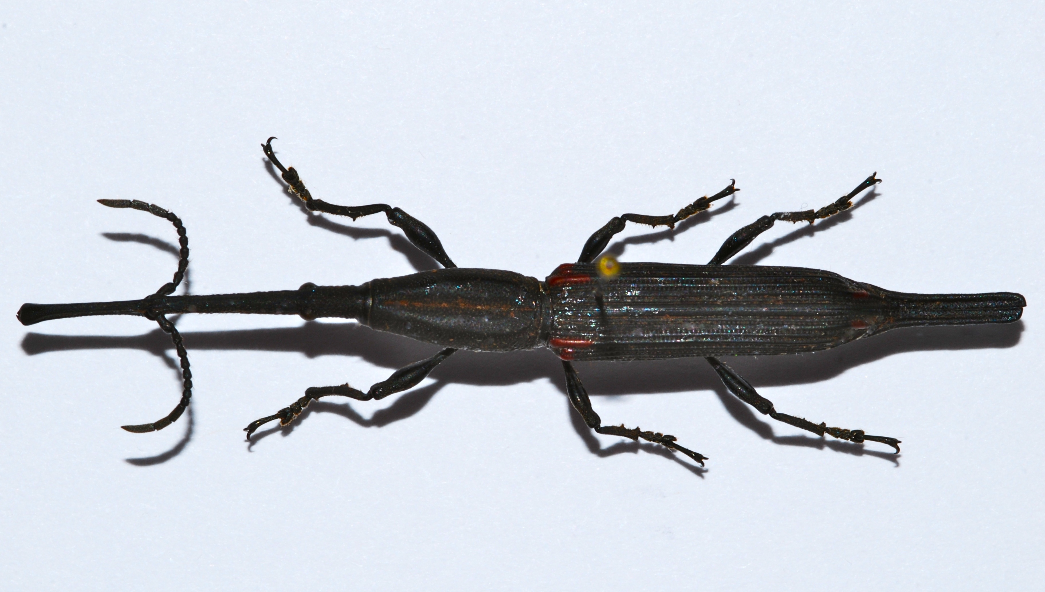 Mananara, MADAGASCAR